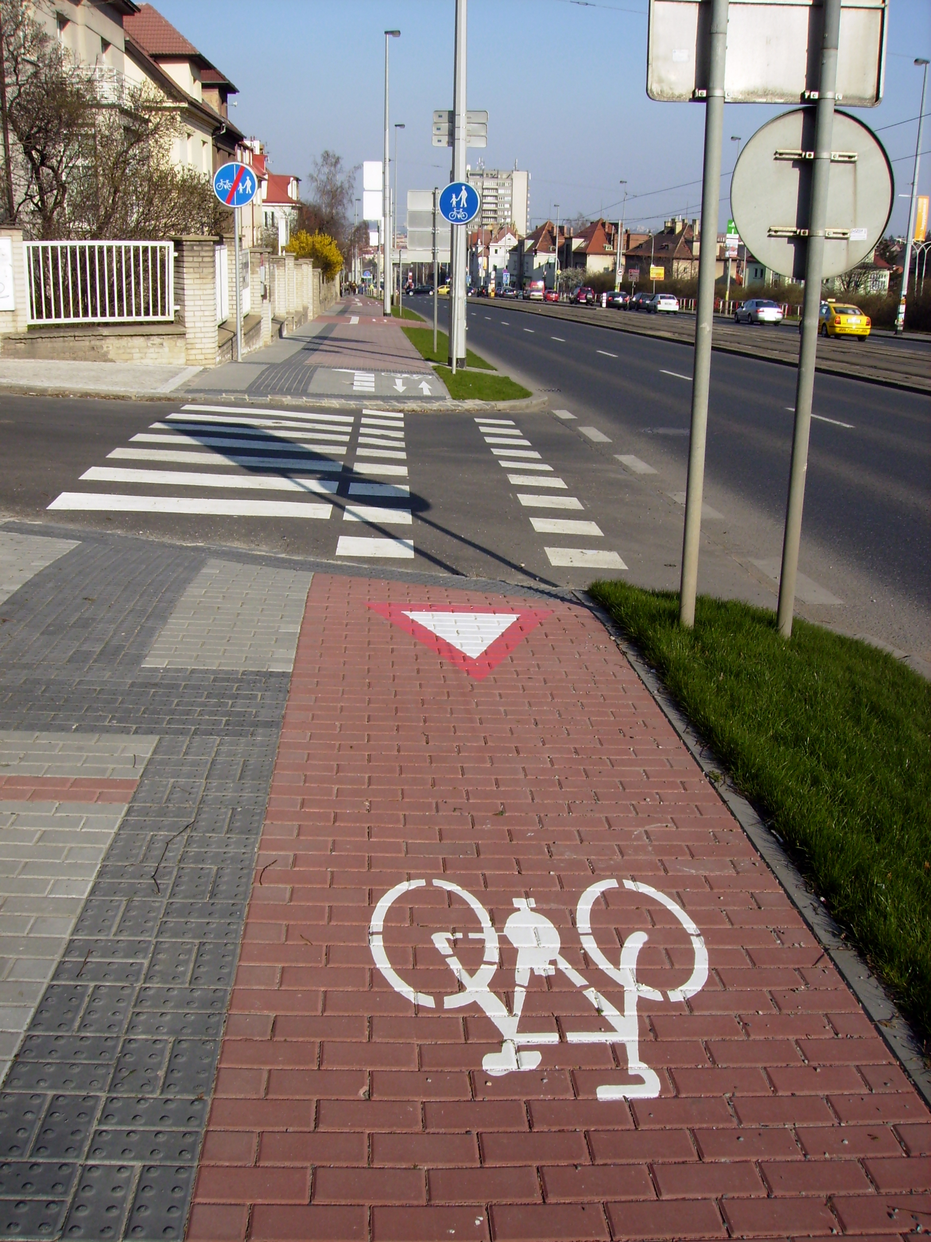 Praha, Dejvice, cyklostezka podél Evropské ulice a přejezd pro cyklisty s přechodem pro chodce přes Vilímovskou ulici u Bořislavky.